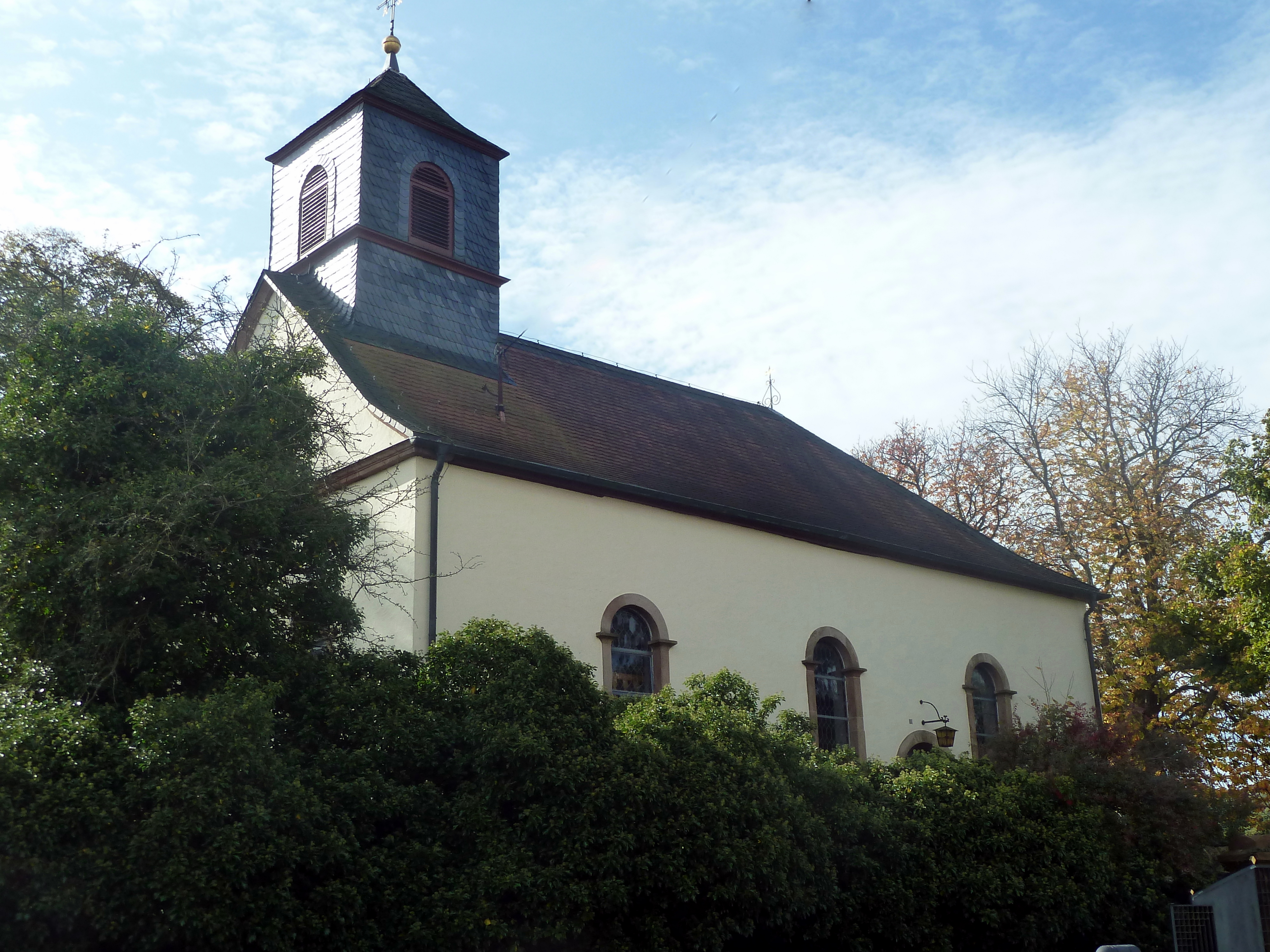 Die prot. Kirche Neunkirchen am Potzberg